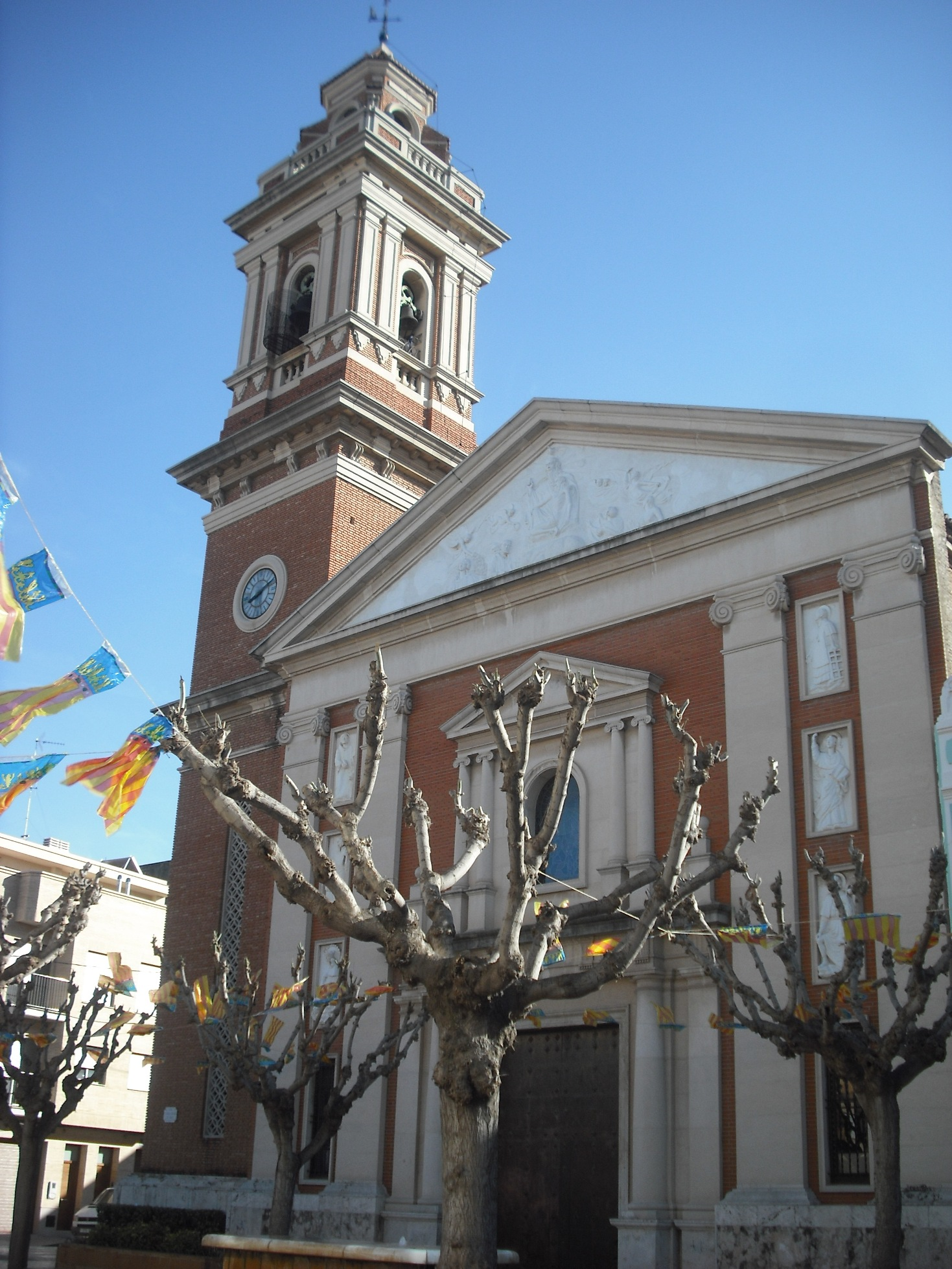 Església de Tavernes Blanques.